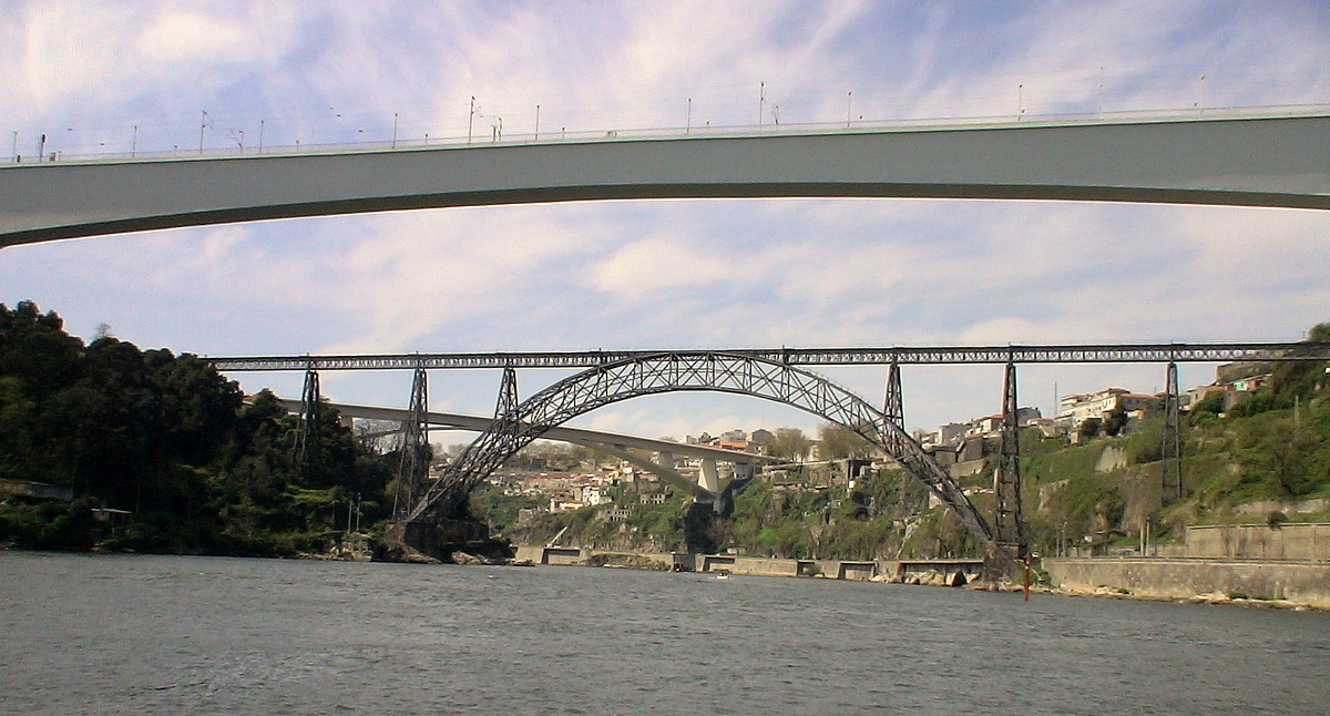 Ponte D Maria - Porto This file was uploaded for Wiki Loves Monuments in Portugal with the unique identifier 70405.